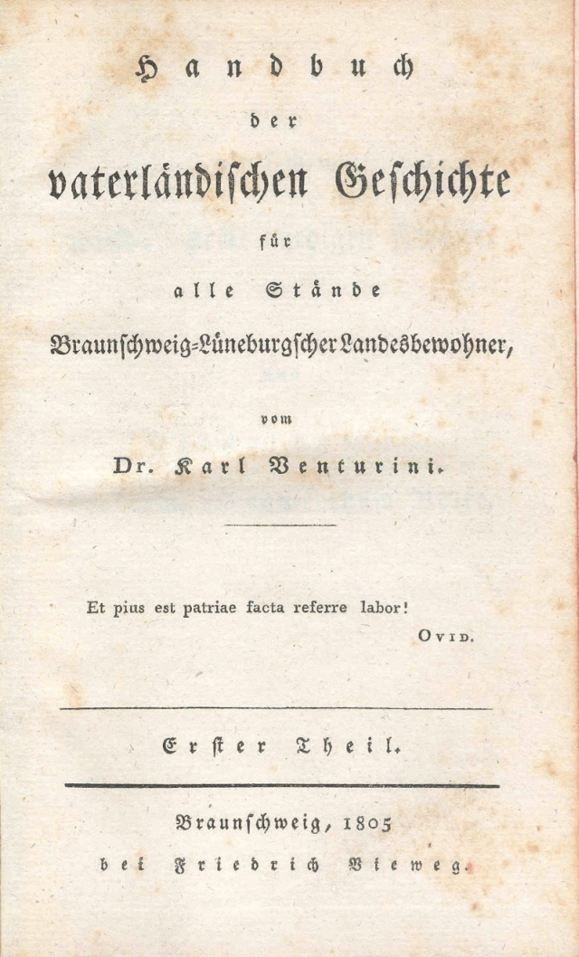 Karl Heinrich Georg Venturini: Handbuch der vaterländischen Geschichte für alle Stände Braunschweig-Lüneburgscher Landesbewohner Band 1 von 1805.